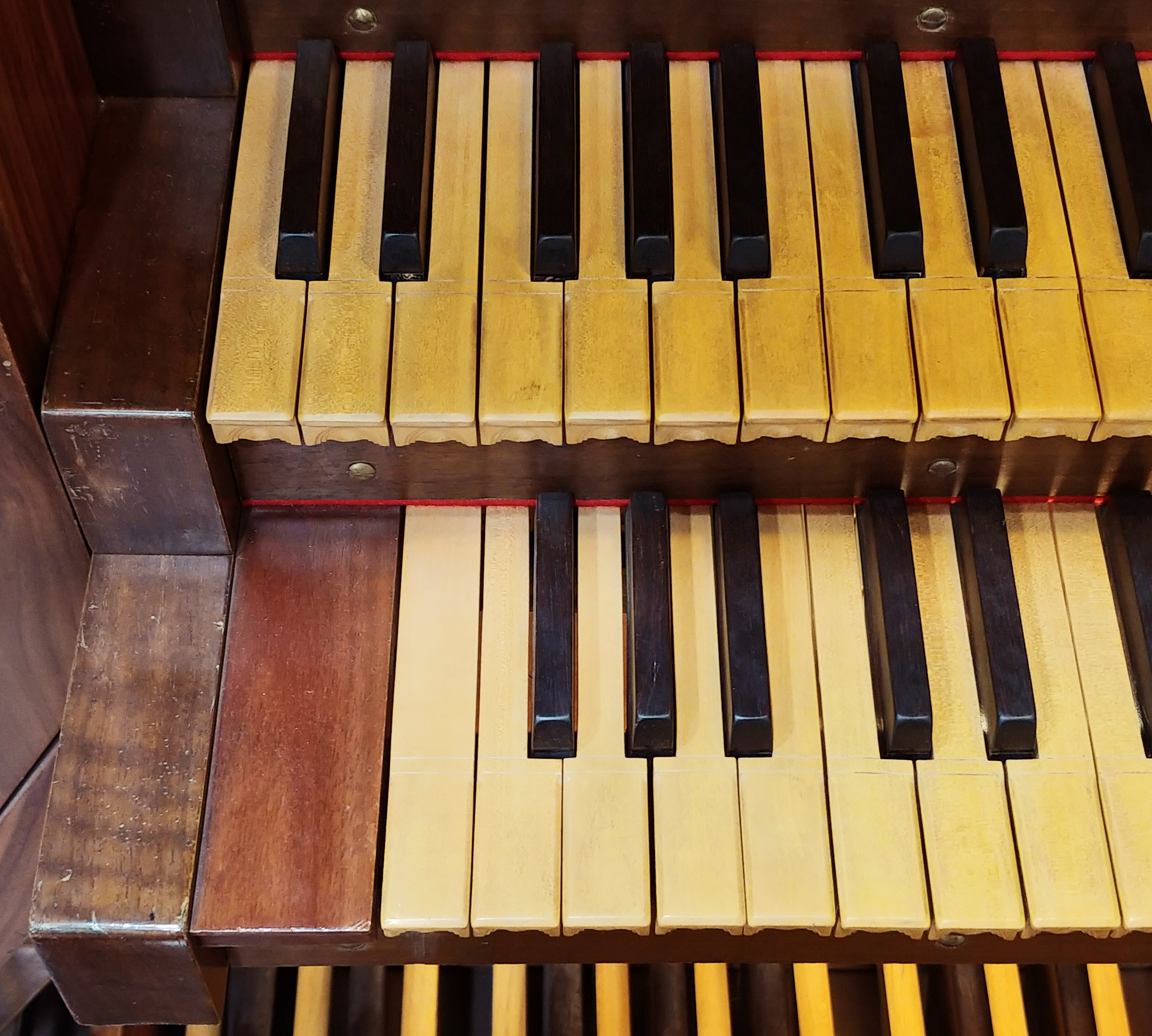 Particolare delle tastiere con la prima ottava scavezza del primo manuale e quella cromatica estesa del secondo.